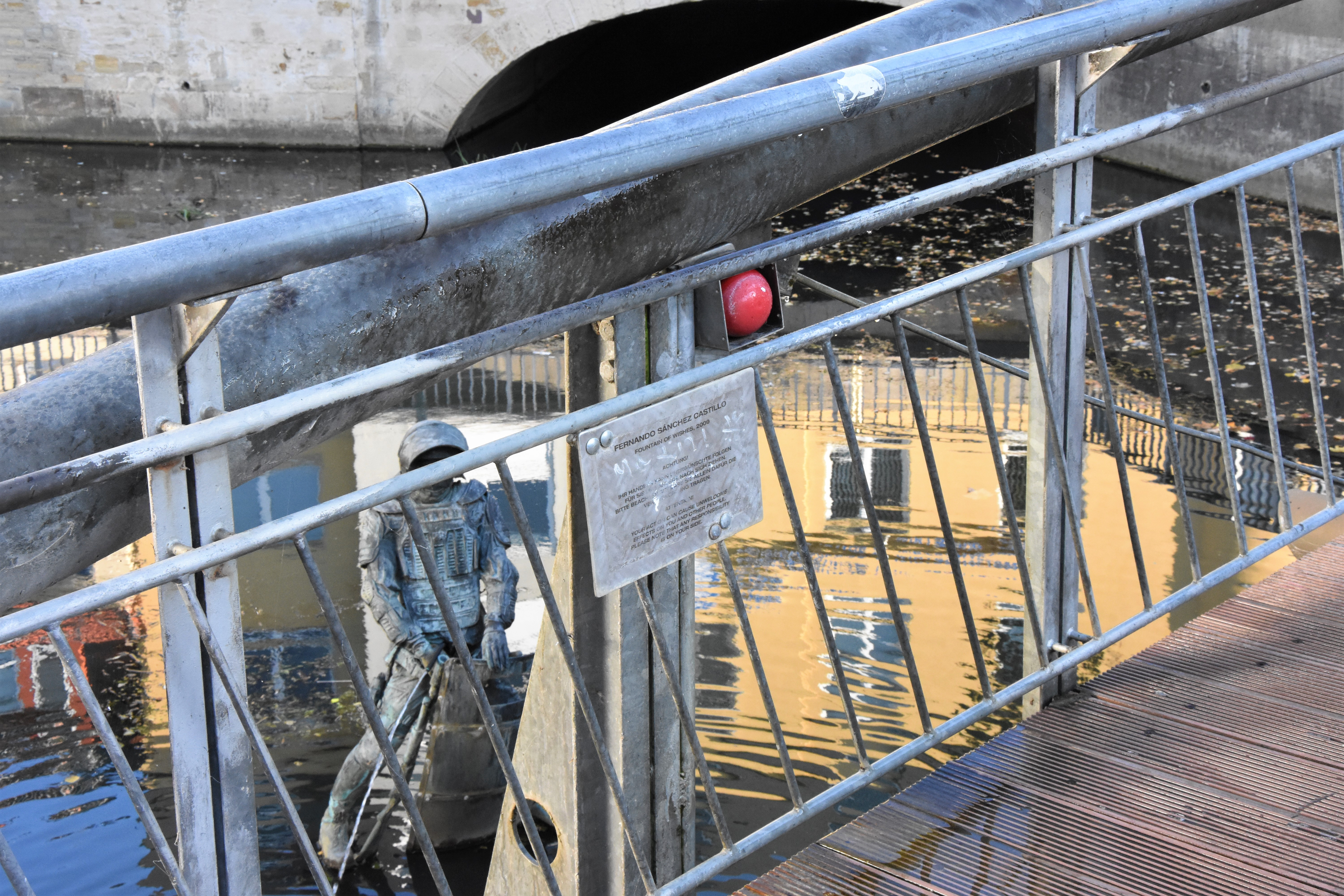 Roter Knopf von Fountain of Wishes (In der Hase in Osnabrück)